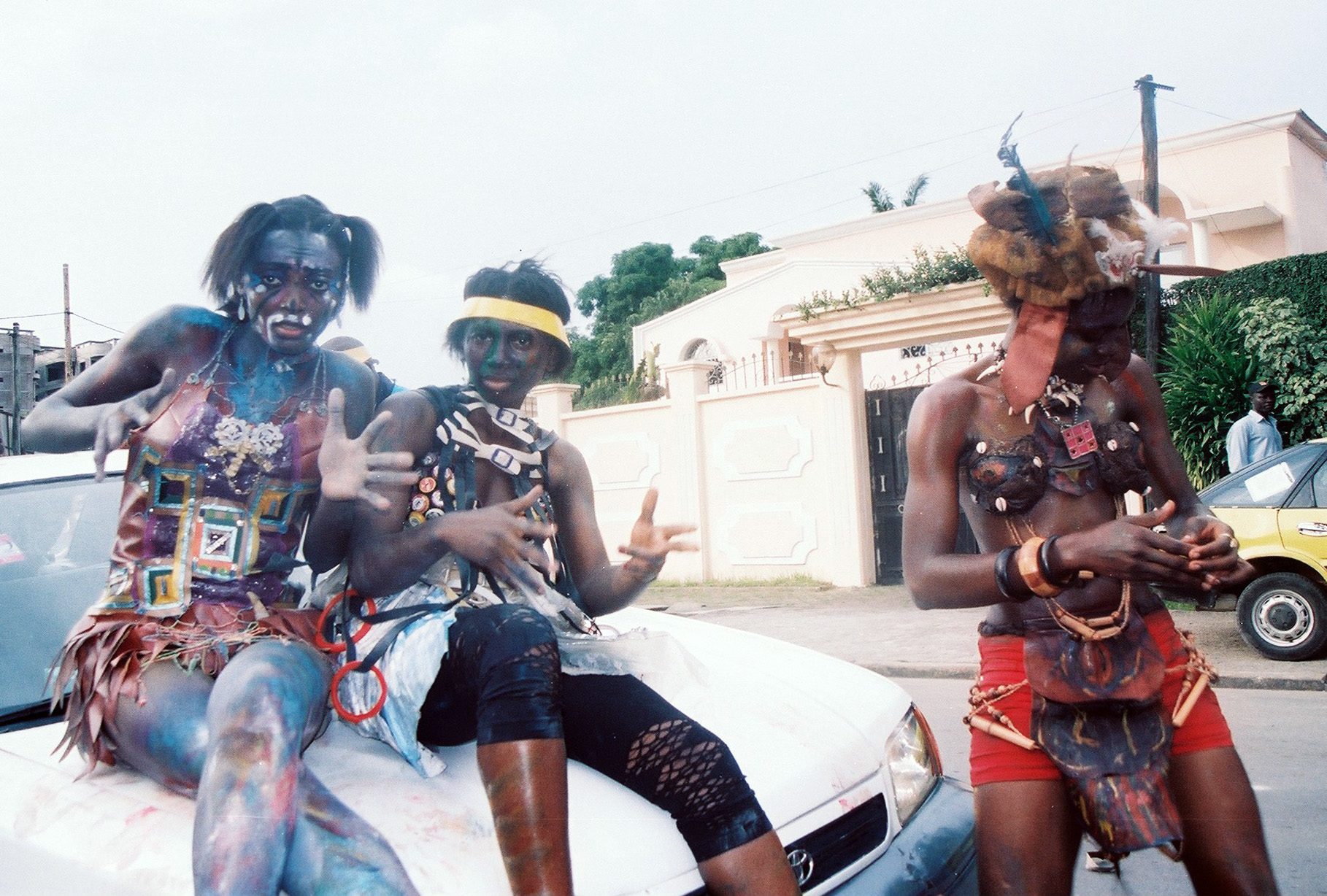 Pendant un carnaval... à Bonapriso (Cameroun) This is an image of Cultural Fashion or Adornment from Cameroon